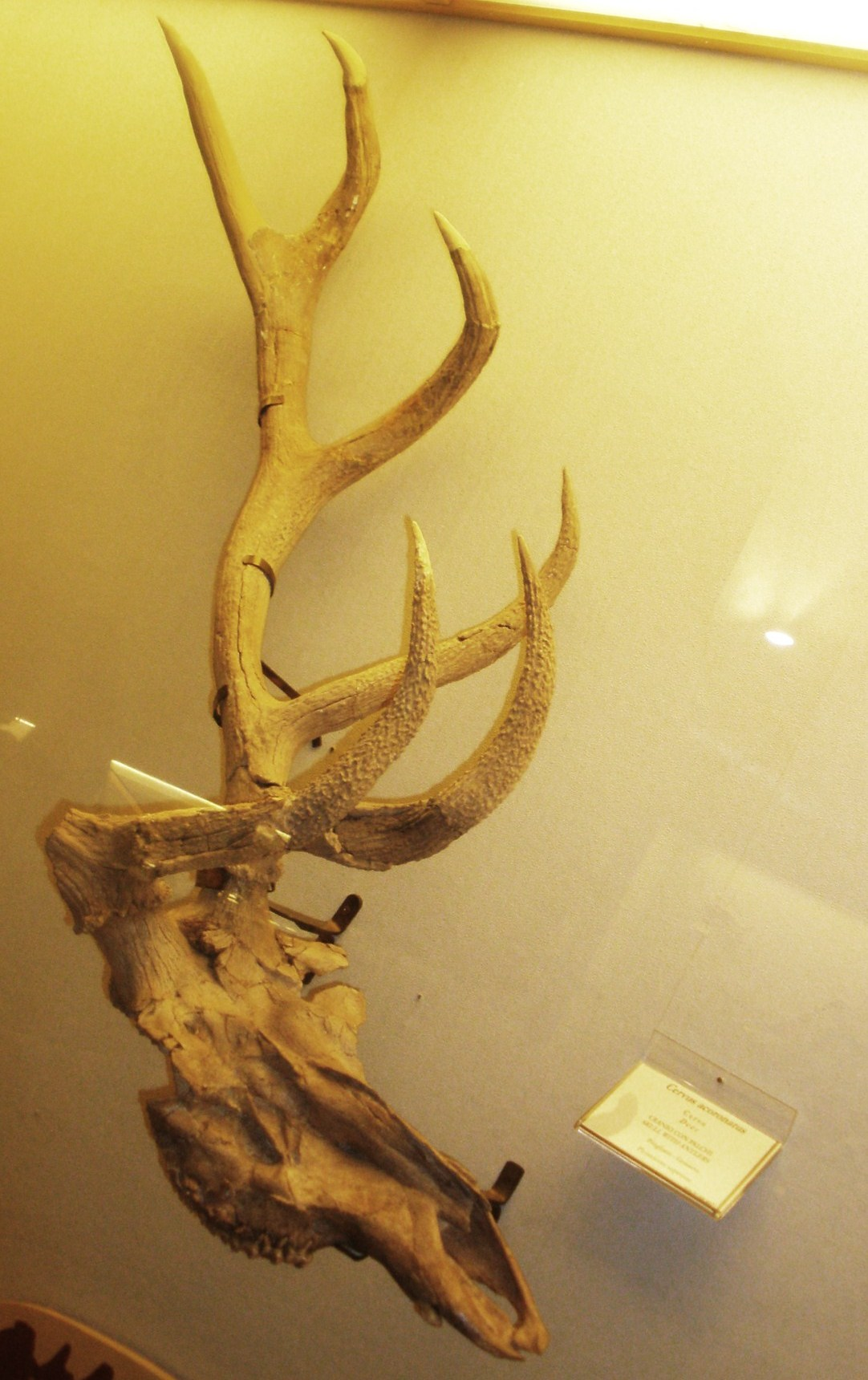 Fossil of Cervus acoronatus, an extinct mammal - Took the picture at Museo di Paleontologia di Firenze